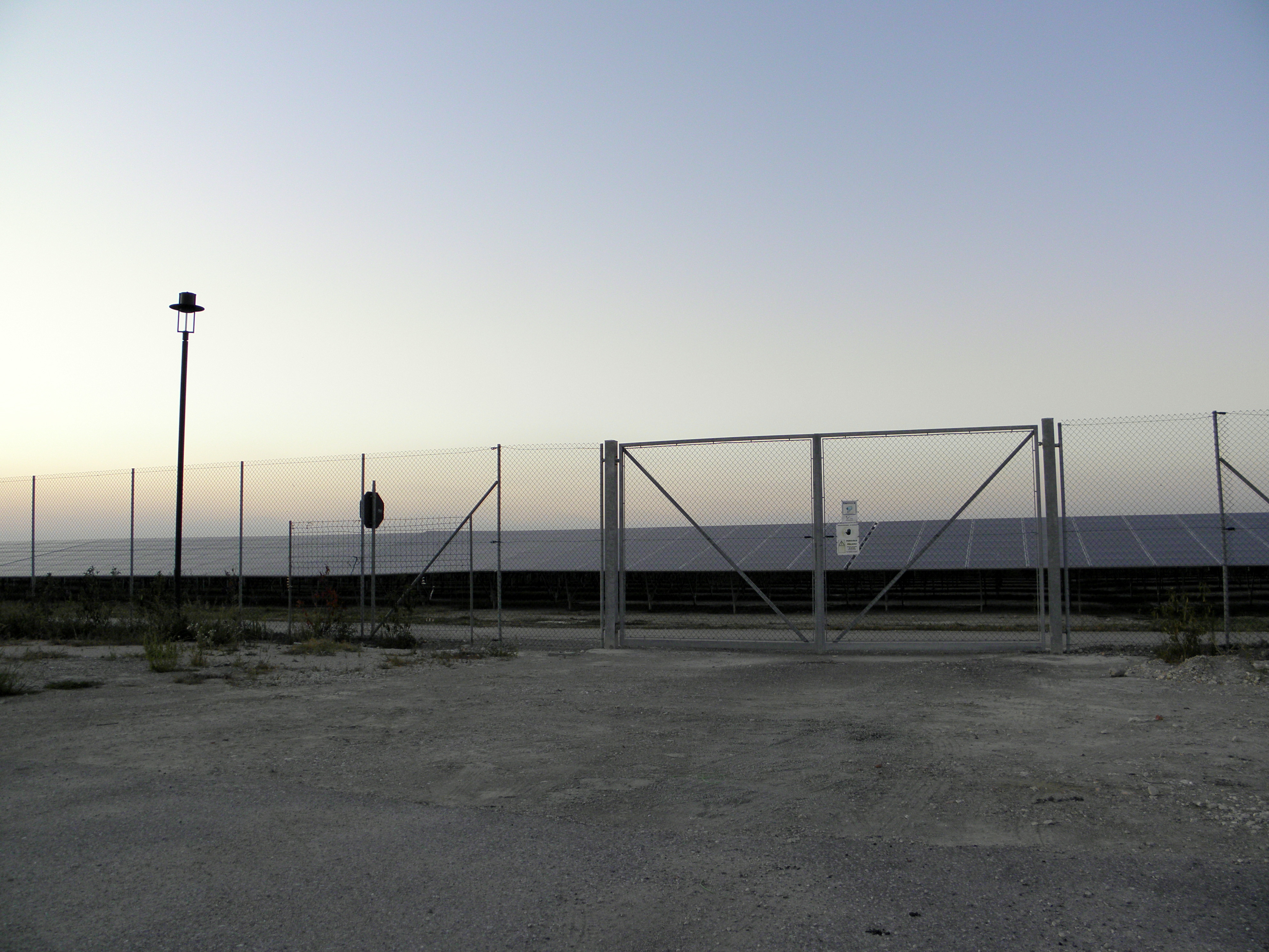 San Bellino: vista di alcuni elementi che compongono limpianto fotovoltaico da circa 70 MW situato qualche km ad est dell'abitato, al 2011 il più grande d'Europa.